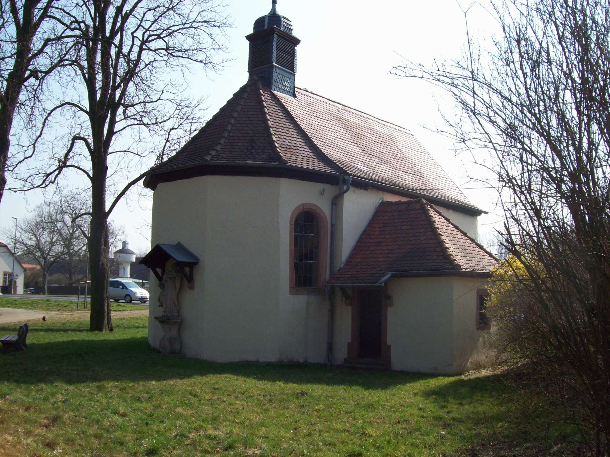 Kilianskapelle Aschaffenburg-Nilkheim 1720 errichtet